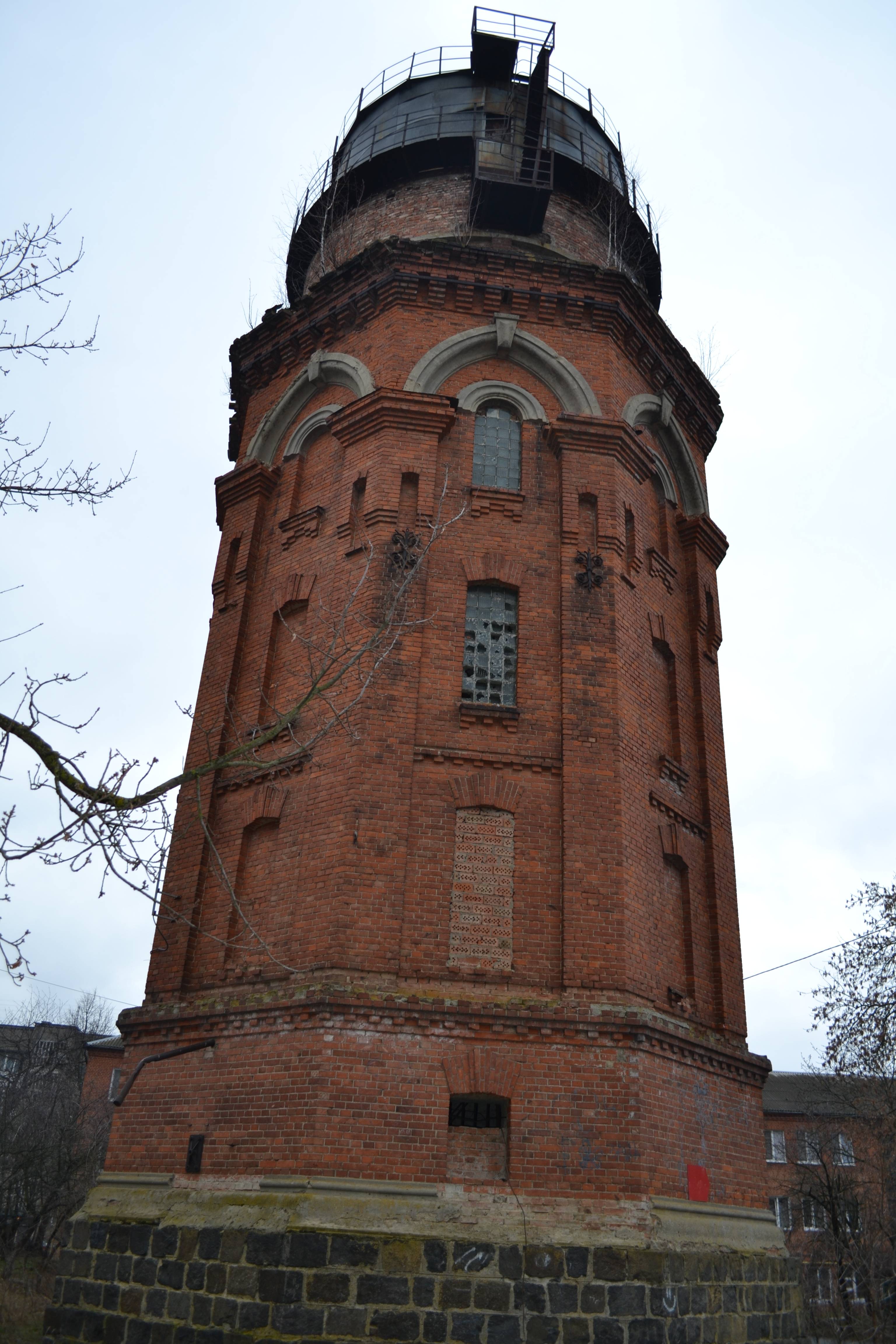 на фото зображена водяна башта